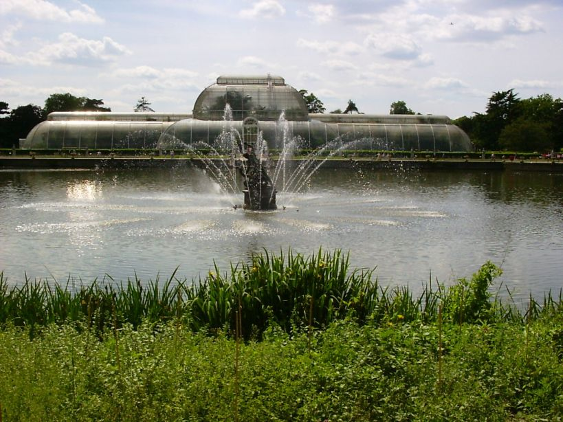 palmhuis kew gardens - eigen foto